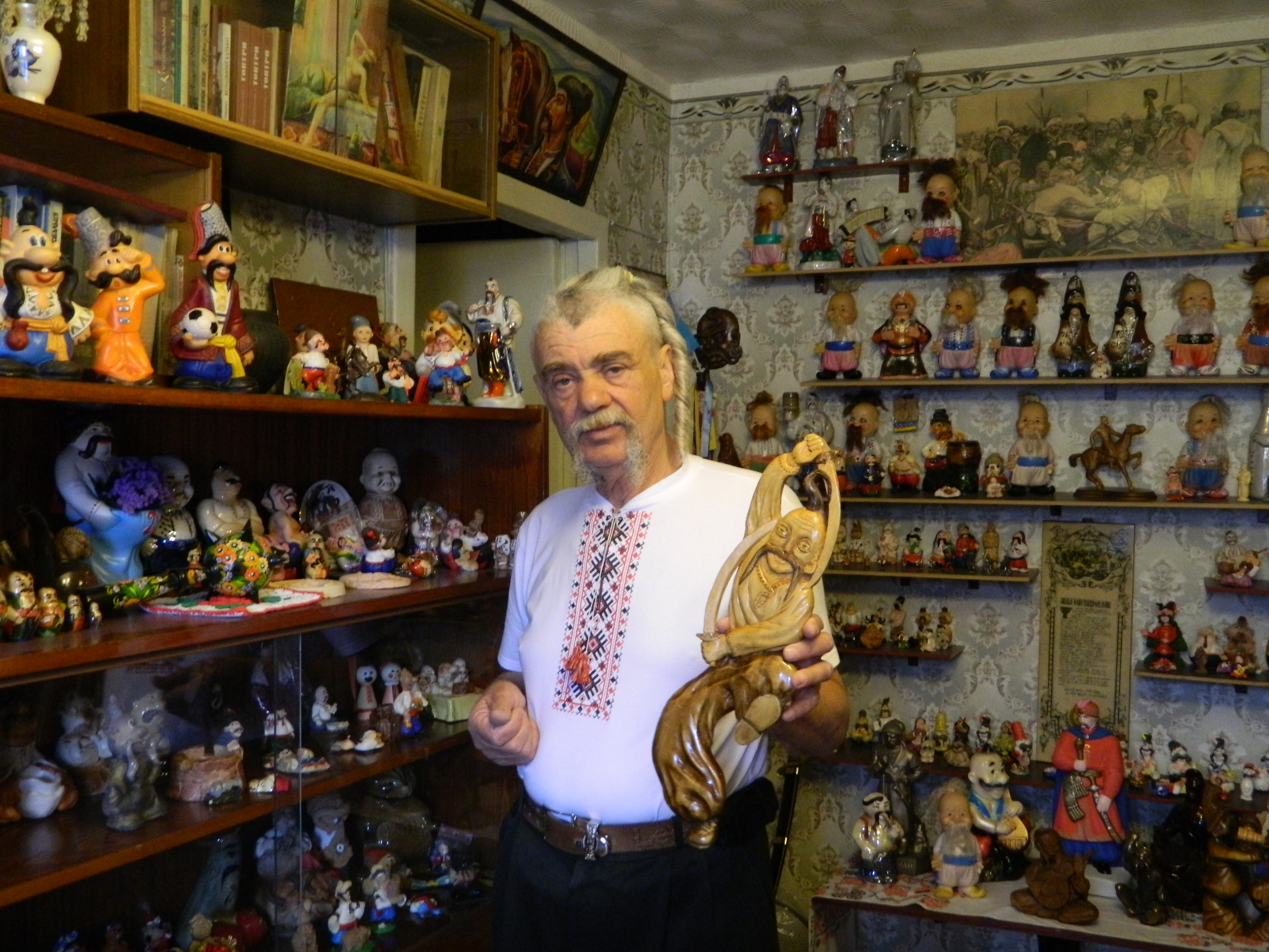 Борис КОВТОНЮК біля власної колекції міні-фігур козаків